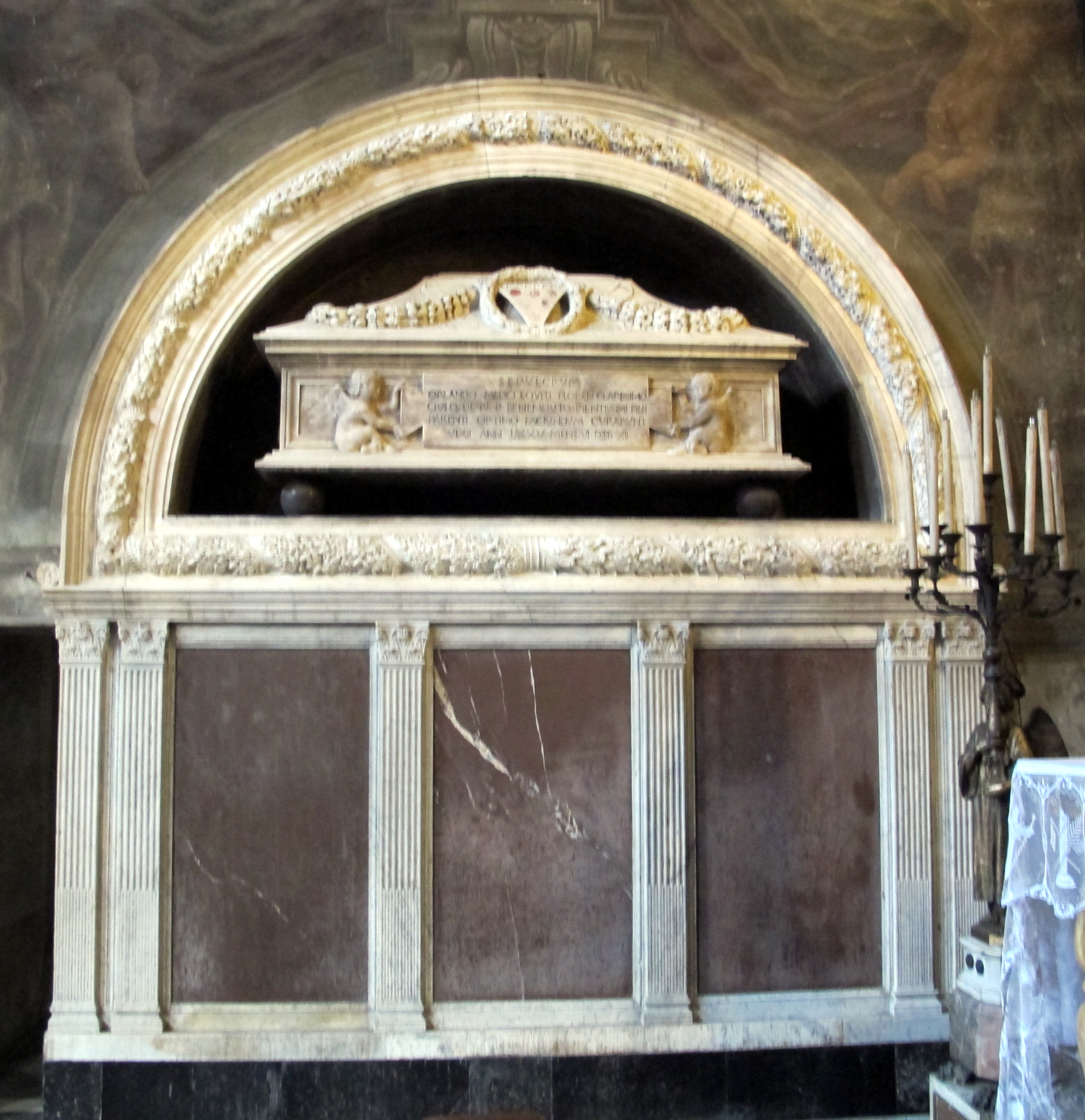 Annunziata, tomba di Orlando di Guccio de' Medici, di Bernardo Rossellino